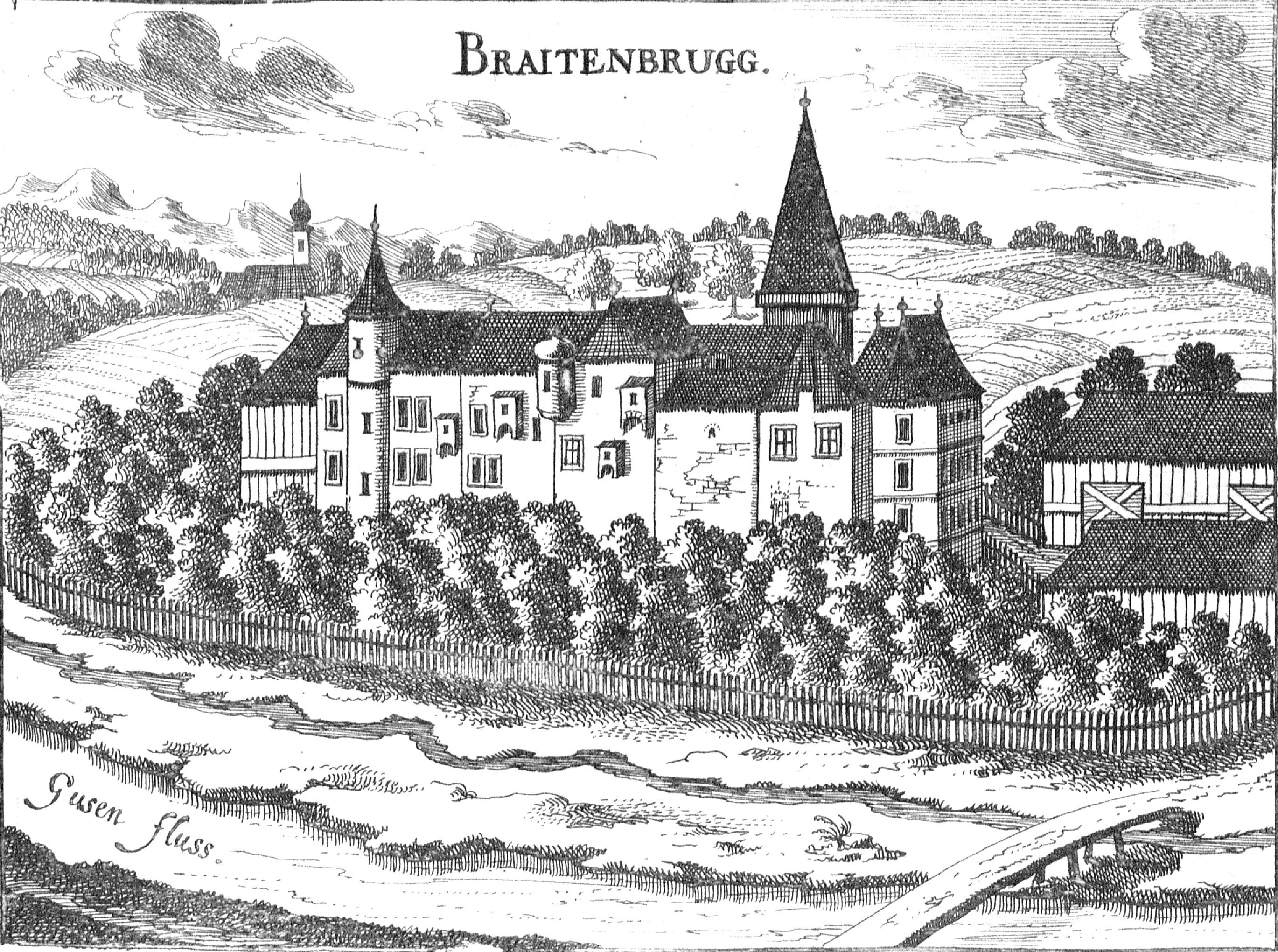 Schloss Breitenbruck nach Vischer